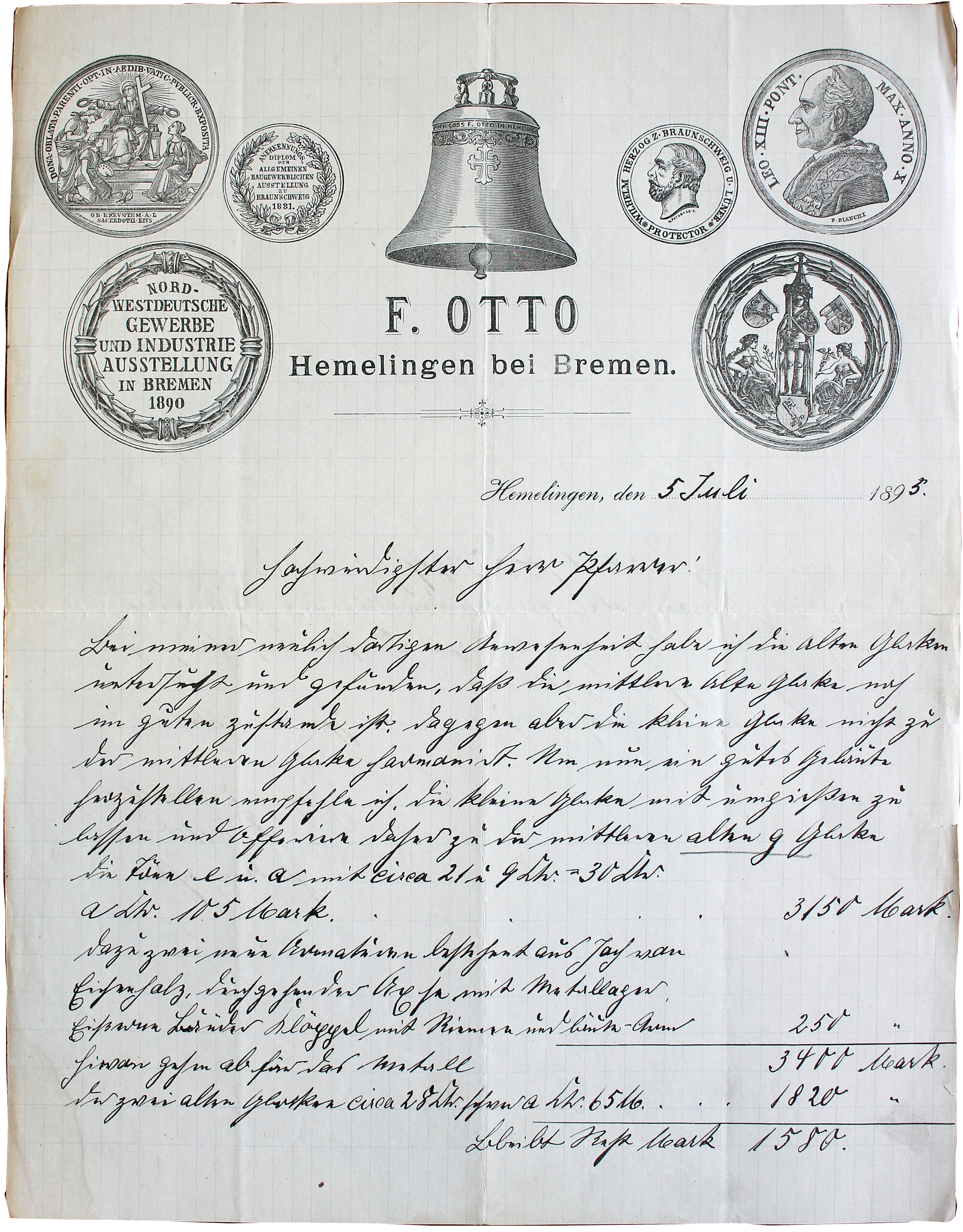 Angebot der Glockengießerei Otto aus Hemelingen bei Bremen über die Lieferung eines Geläuts für die Pfarrkirche St. Mauritius Kärlich vom 5. Juli 1895